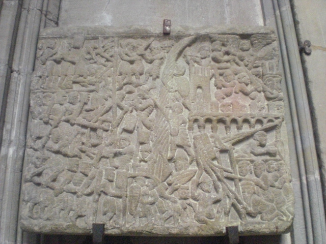 Mezepoka basreliefo